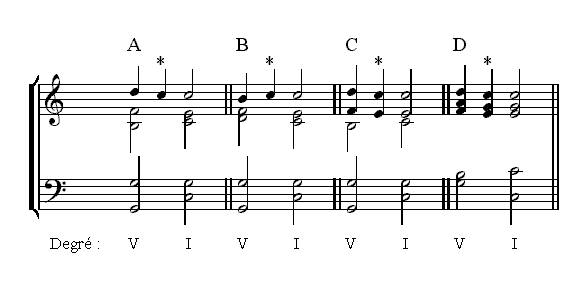 Description : Anticipation Source : Personnelle Licence : GFDL